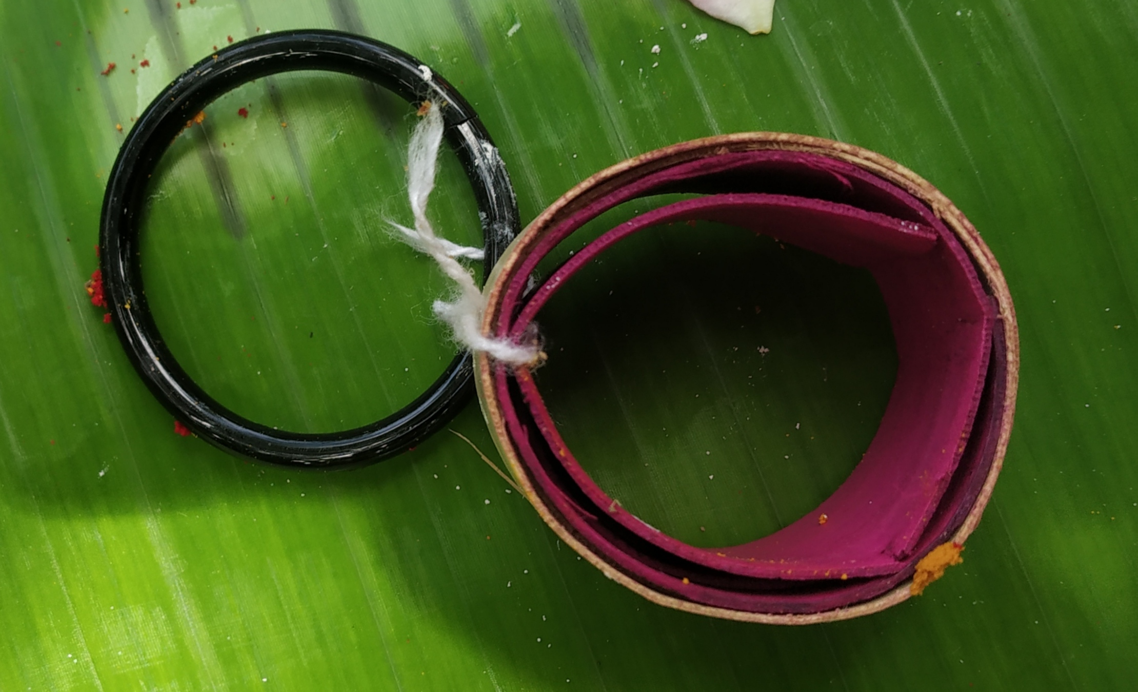 ஆடி 18 நாளன்று கன்னிமார் பூசைக்கு படைக்கப்படும் காதோலை கருகமணி